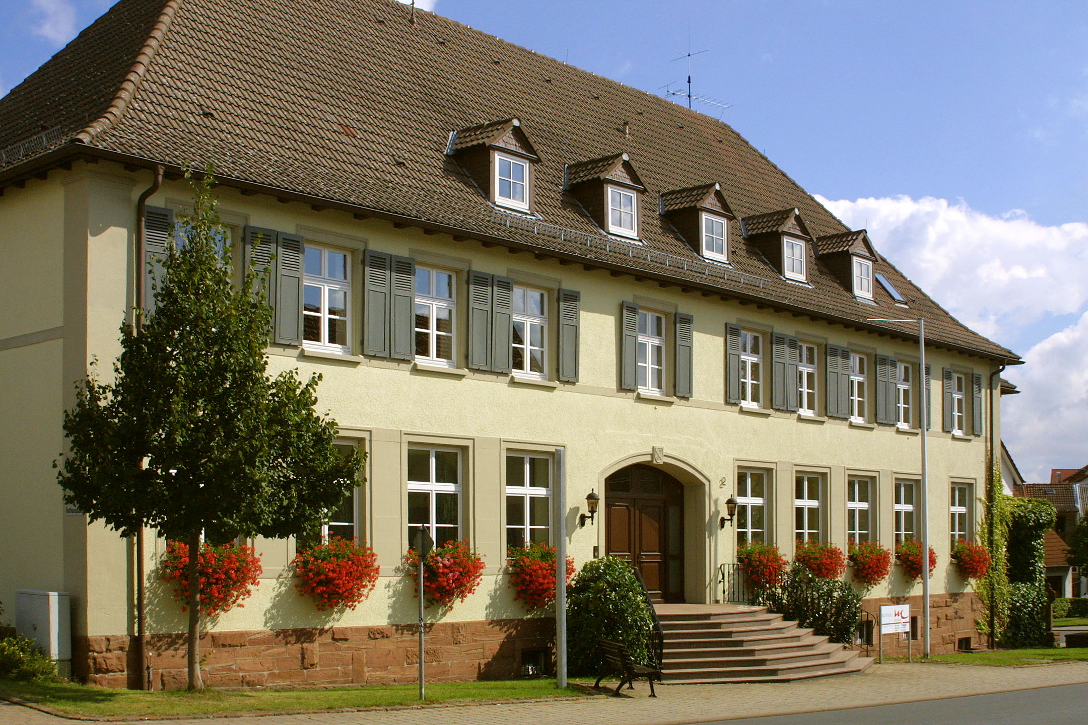 Das neue Rathaus in Mudau